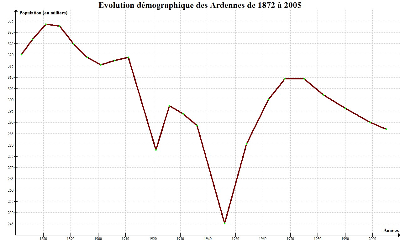 Courbe montrant la croissance de la population du département des Ardennes entre 1872 et 2005